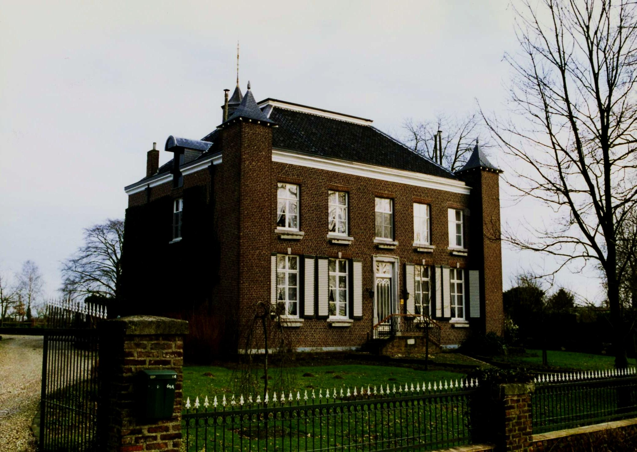 Kasteel Malborgh te Buggenum.